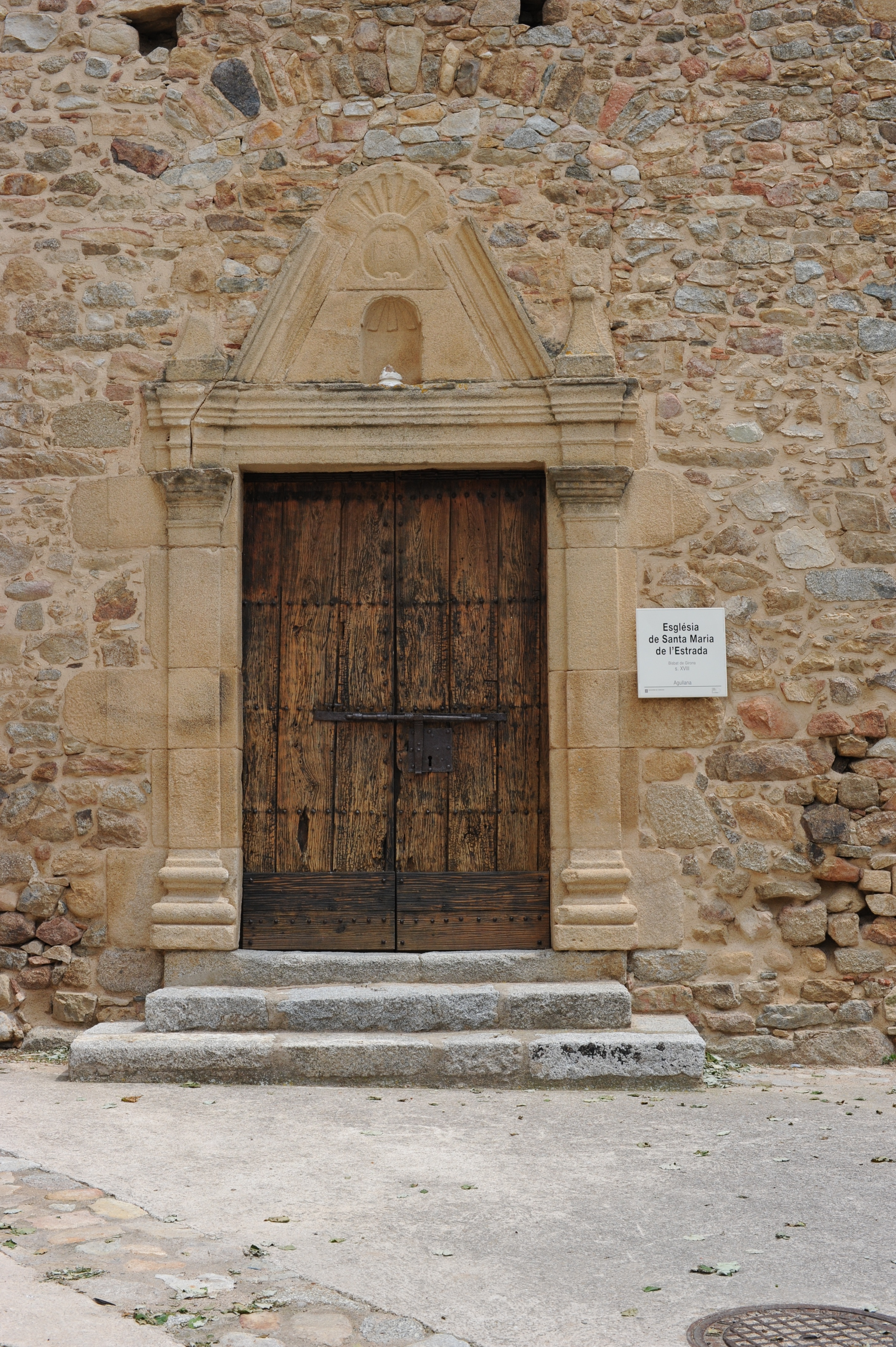 Capella Santa Maria de l'Estrada, Agullana (Alt Empordà, Girona, Catalunya), GR - 174 De Porrera a El Lloar